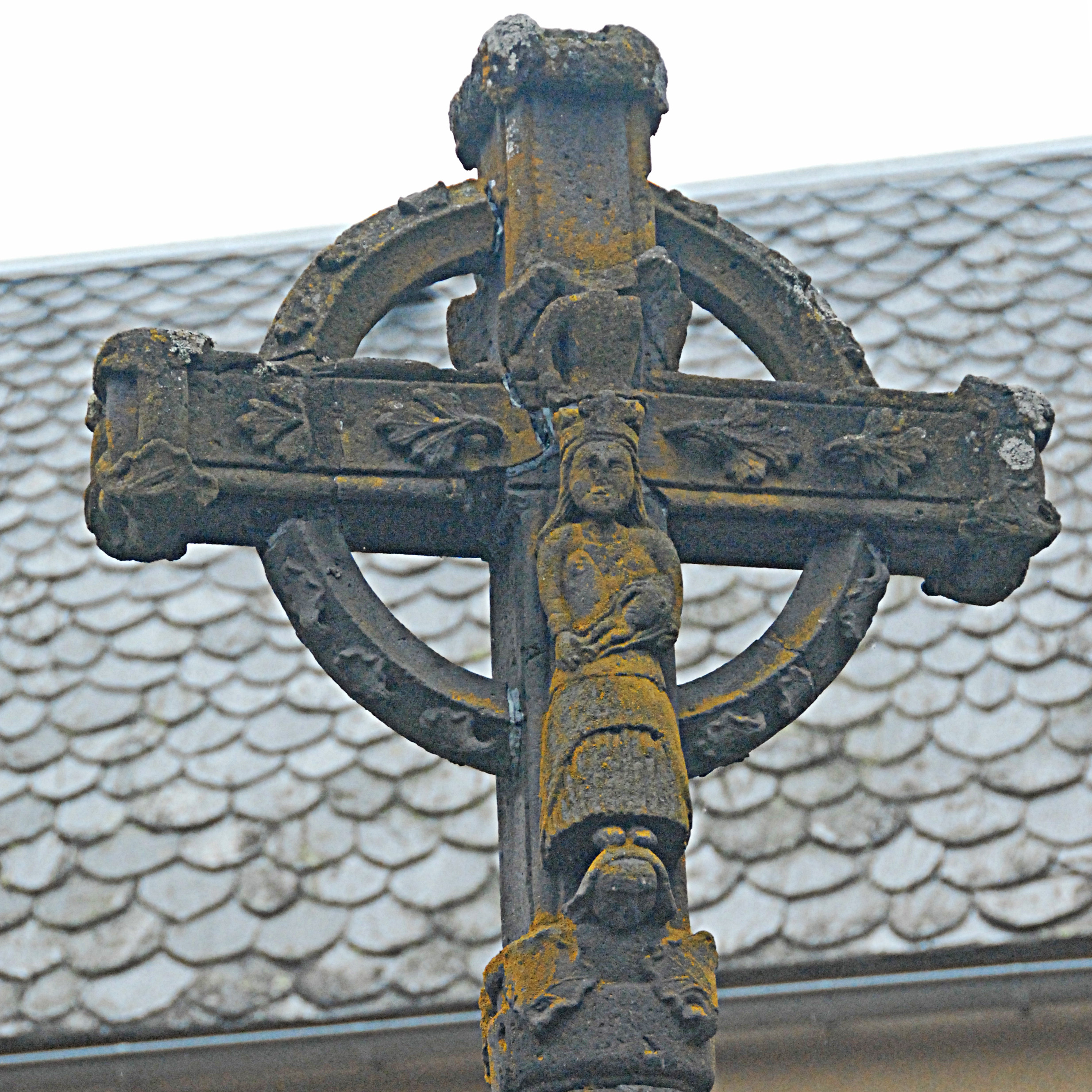 Chambon-sur-Lac,Kreuz auf dem Dorfplatz